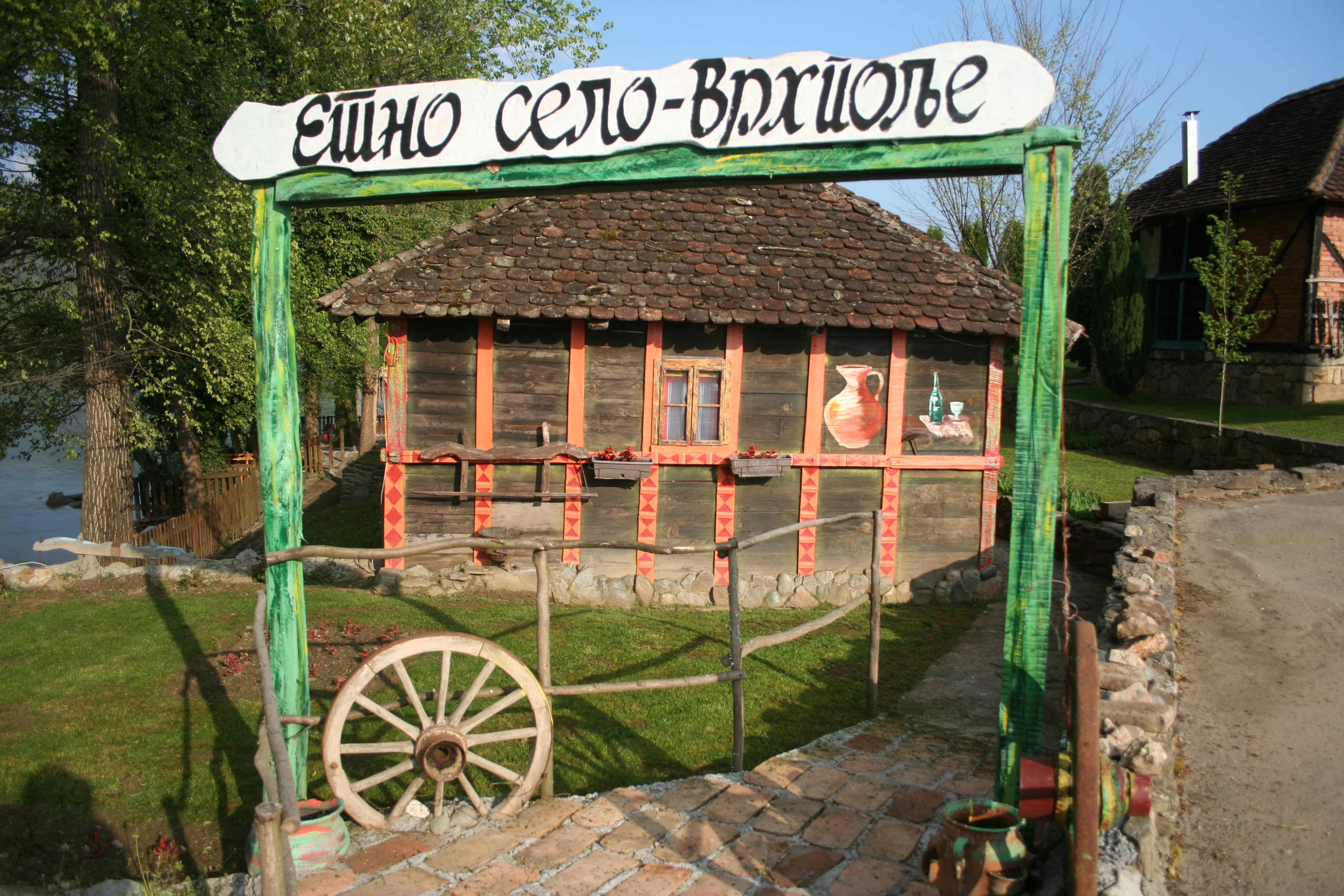 Etno selo Vrhpolje